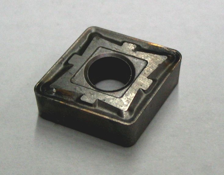 Wendeschneidplatte / disposable tip